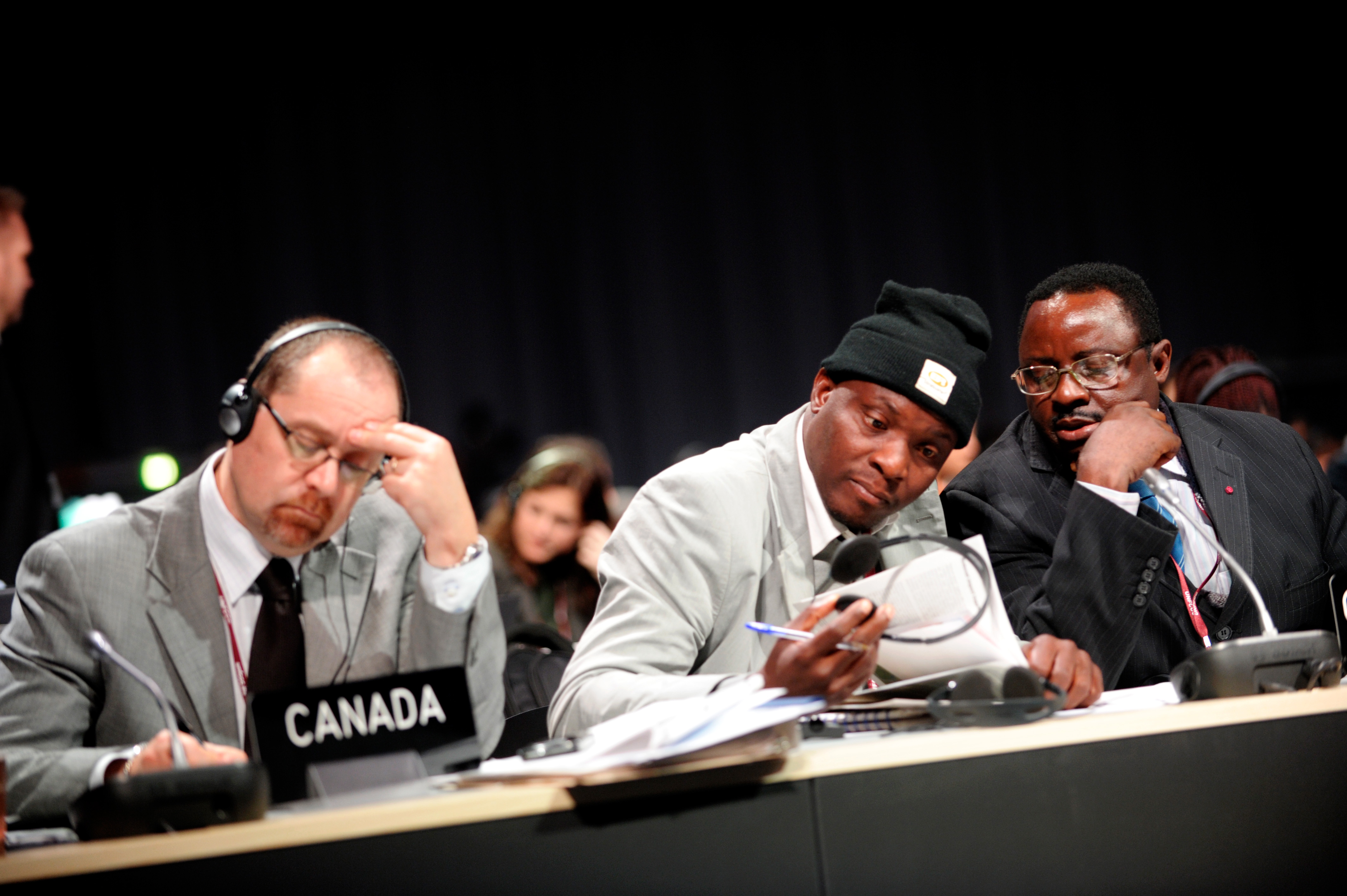 Delegater vid COP15 i Köpenhamn 2009